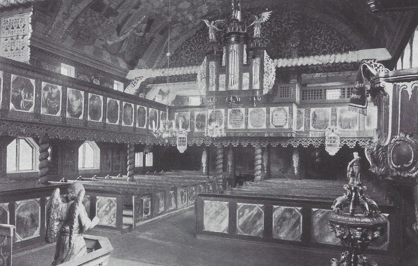 Innenraum der Kirche in Katznase, Ostpreußen